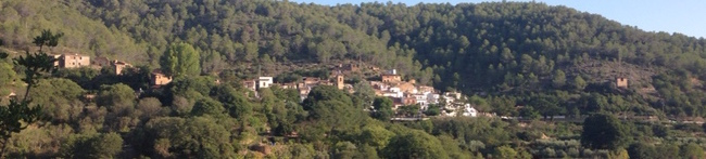 Vista de Veo des del camí d'Aín